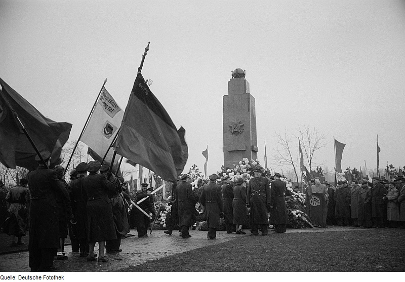 Original image description from the Deutsche FotothekSowjetischer Ehrenhain